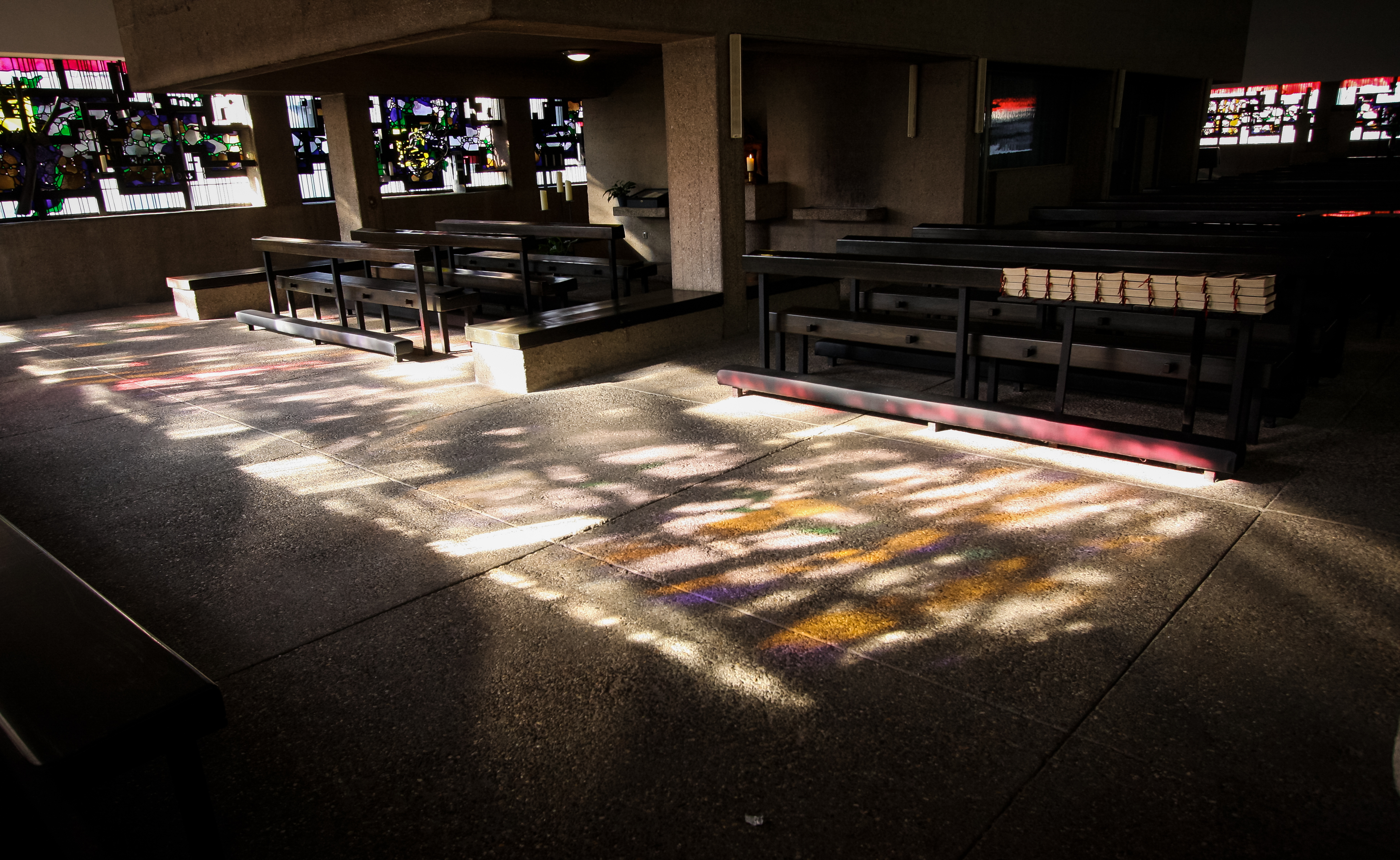 St. Johannes der Täufer, Köln, Architekt: Gottfried Böhm